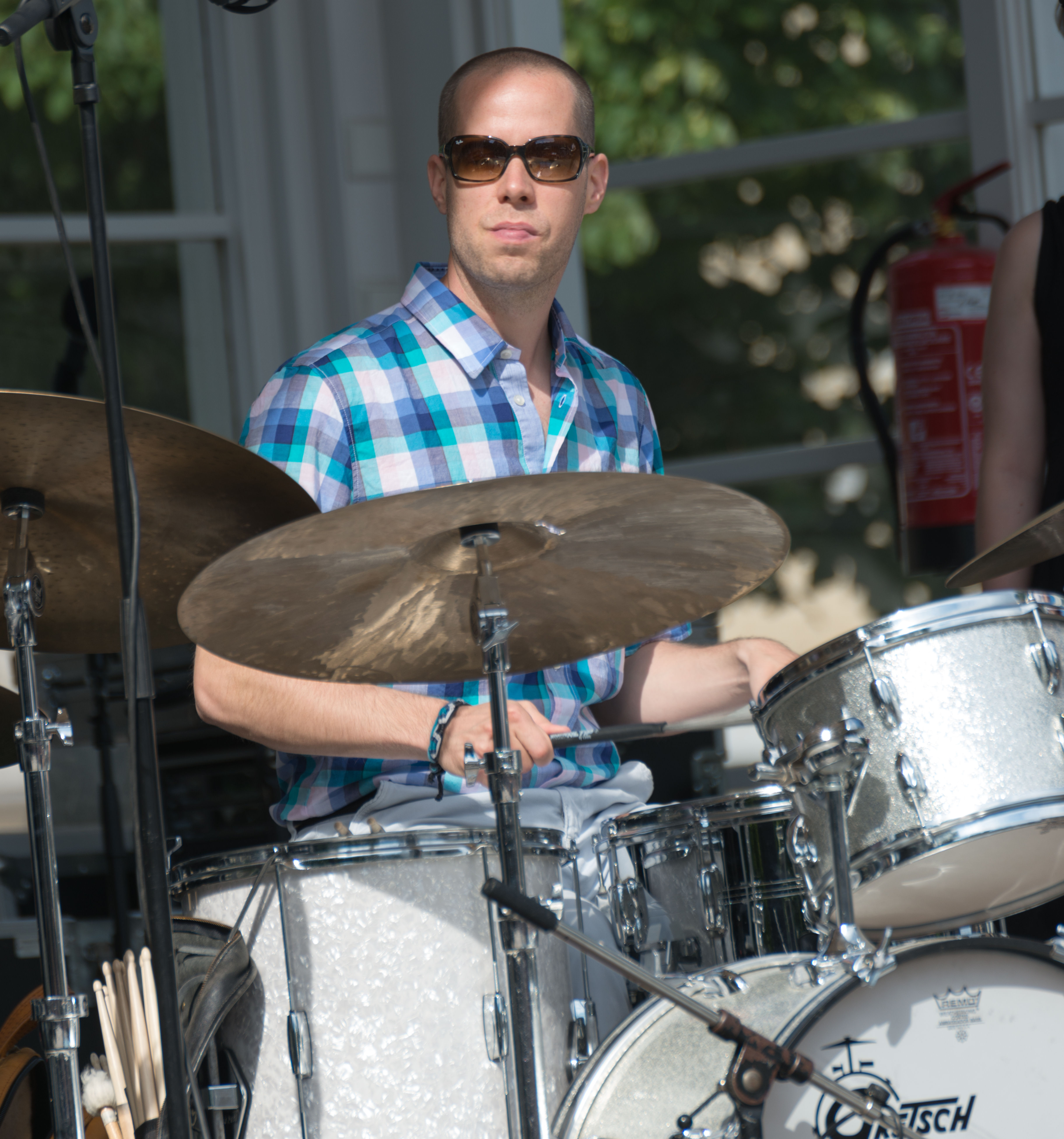 Jussi Lehtonen suomalainen rumpali